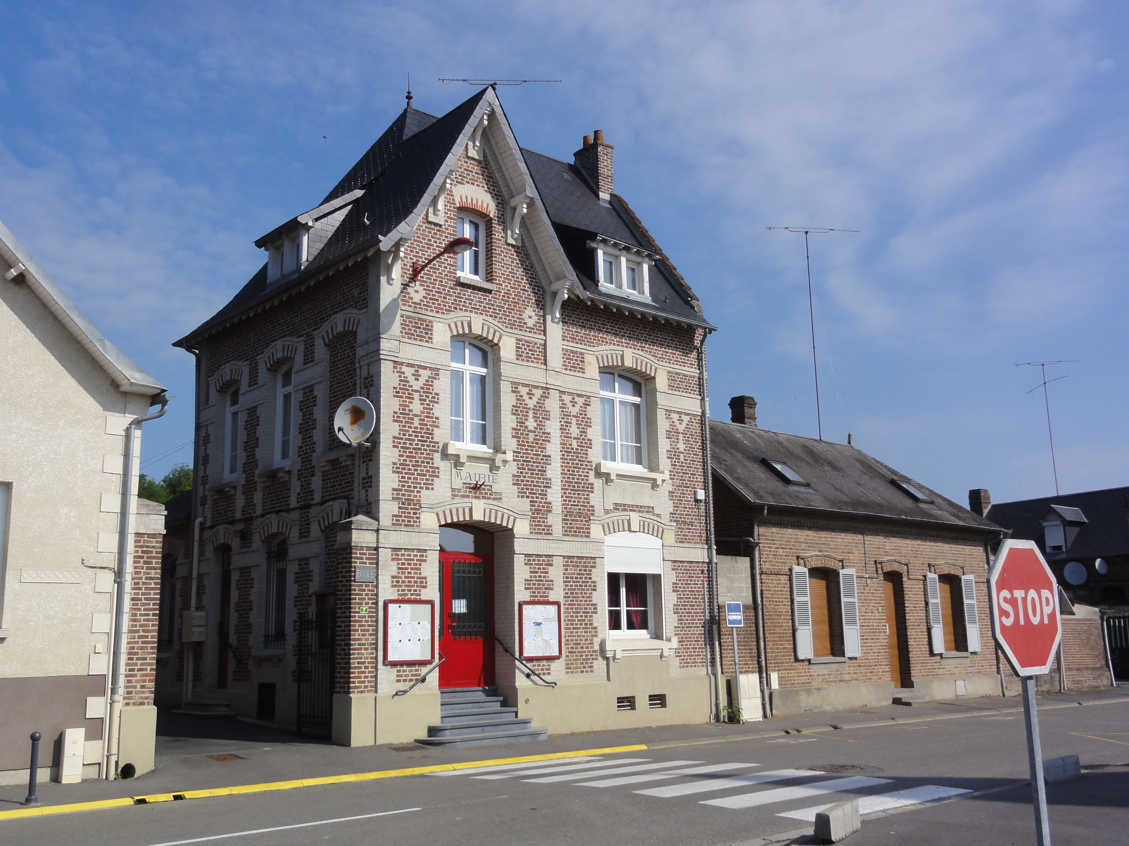 Neuvillette (Aisne) mairie